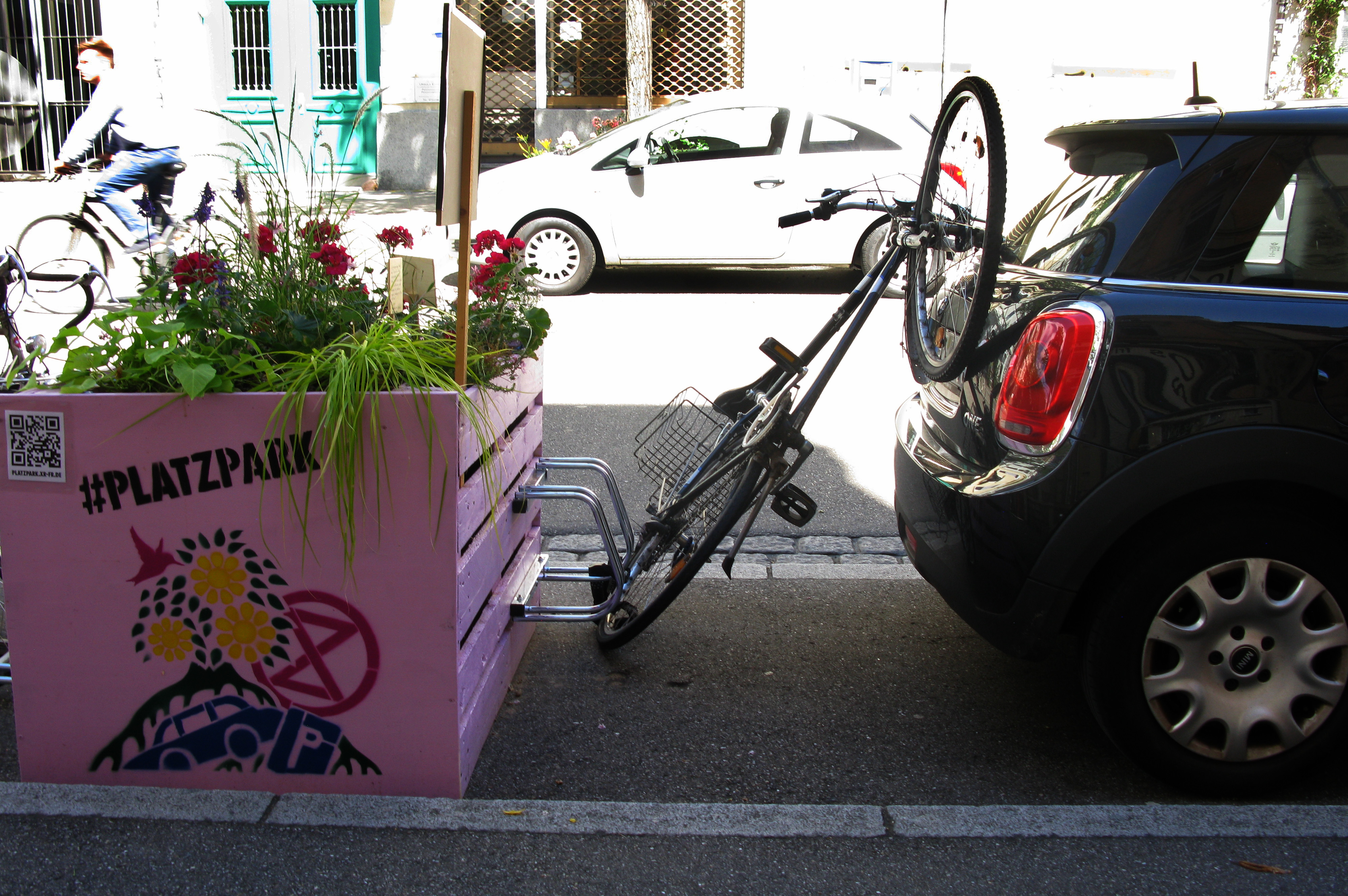 Platzpark: bepflanzte Parkplätze im Freiburger Sedanviertel auf Initiative von Extinction Rebellion Freiburg